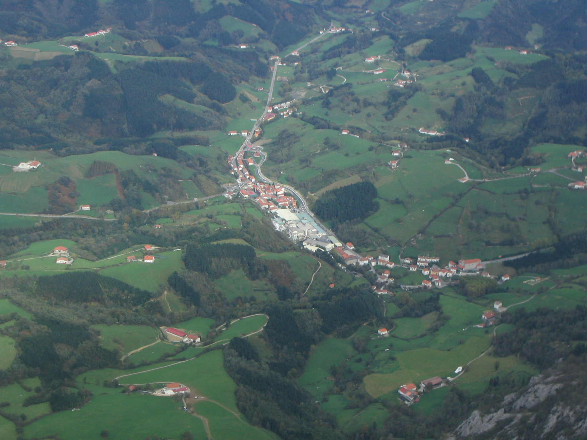 Vista general de Amezketa. Vista general de Amezketa, Guipúzcoa, País Vaco, España.